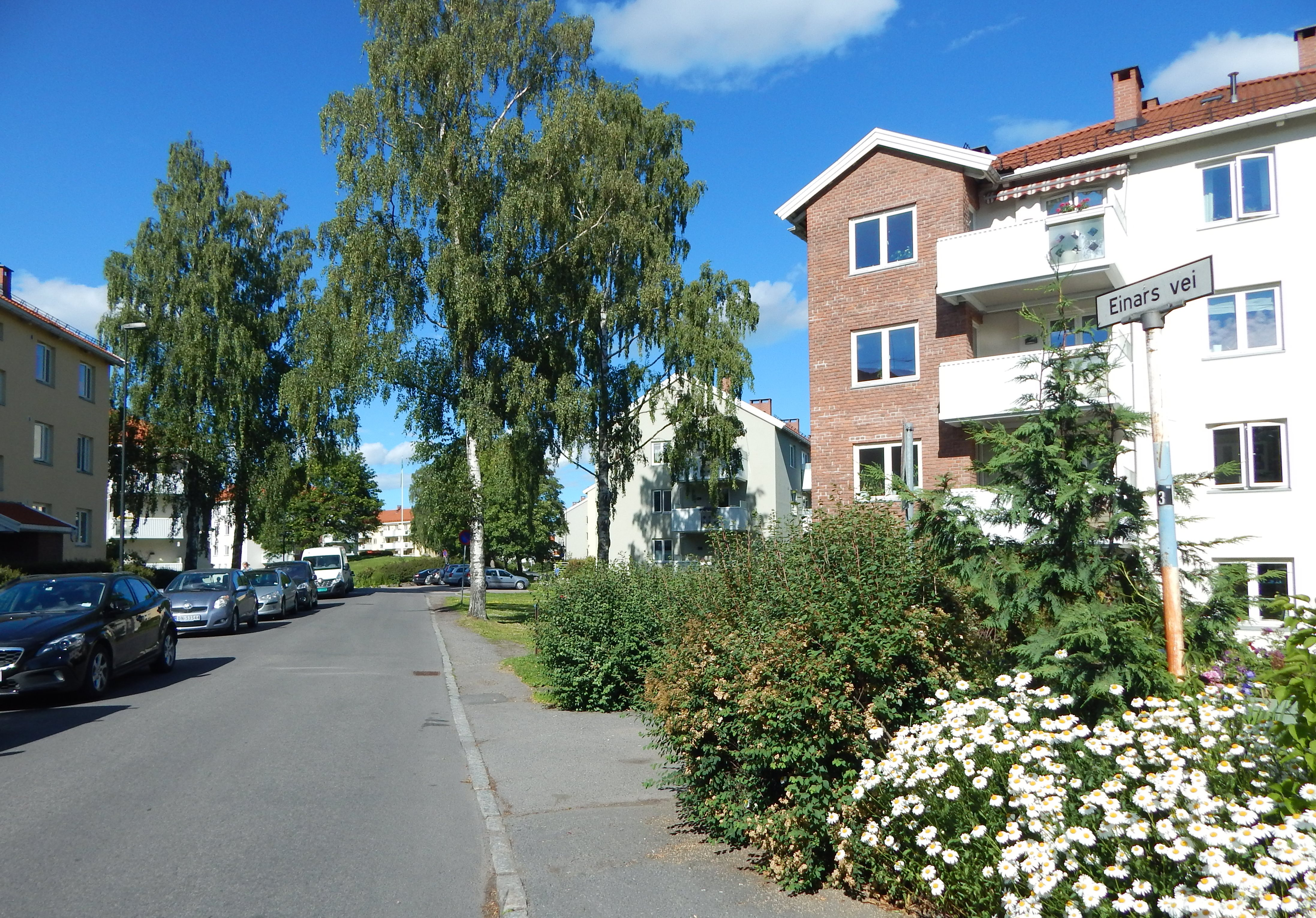 Einars vei